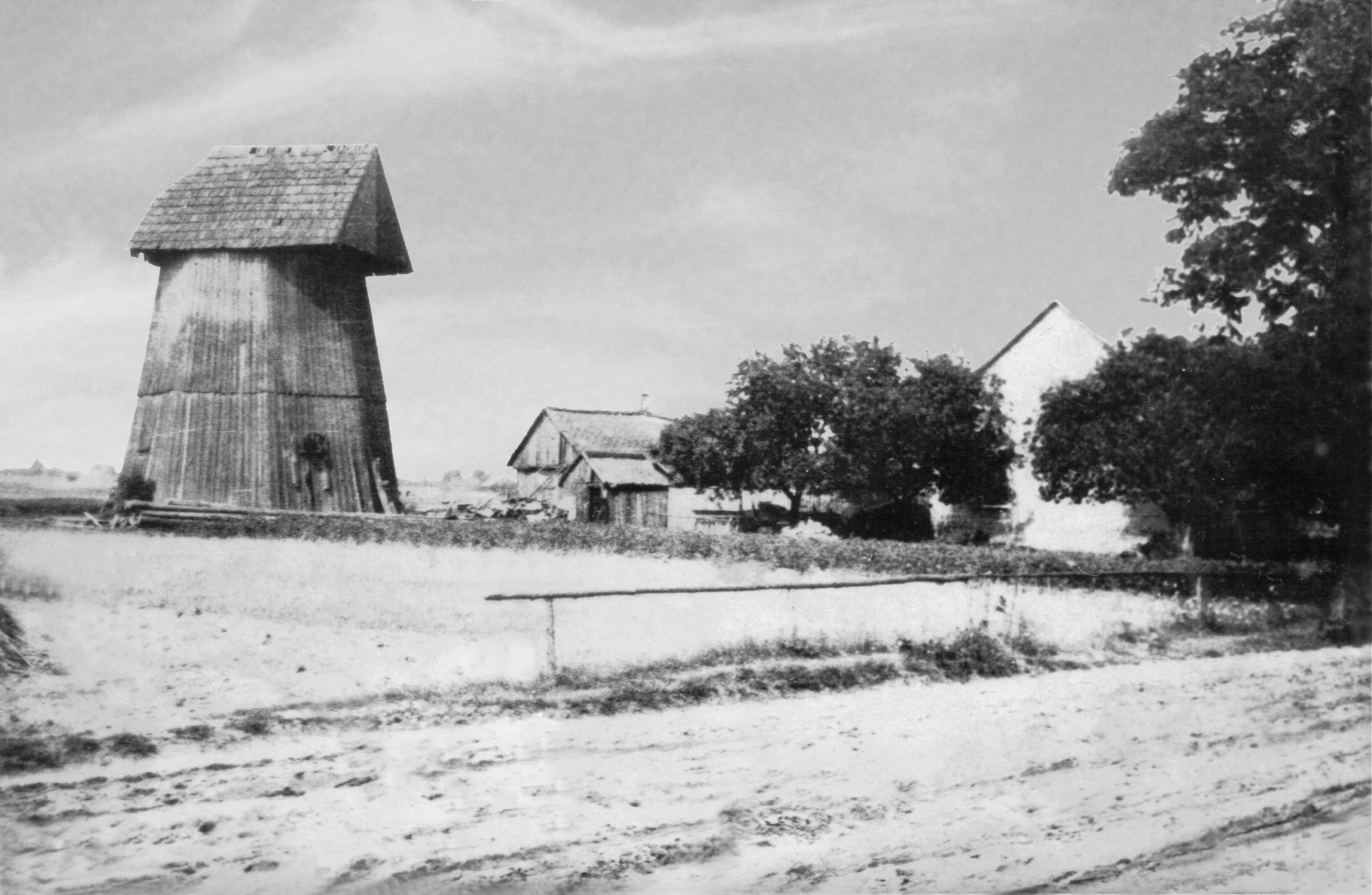 Wiatrak w Ciężkowicach, Gmina Gidle (Zdjęcie retuszowane) Fotografia wykonana w 1963 roku, Na zdjeciu wiatrak bez śmigieł które zerwane zostały przez wichurę w 1945. Został rozebrany w 1968 roku.